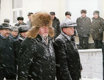 М. С. Евдокимов. 2004 год. Михаил Евдокимов у здания нового железнодорожного вокзала в г. Рубцовске Алтайского края.